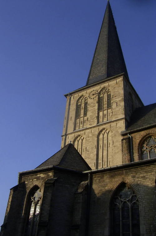 Die Stadtpfarre Maria Himmelfahrt (City-Kirche) in Mönchengladbach